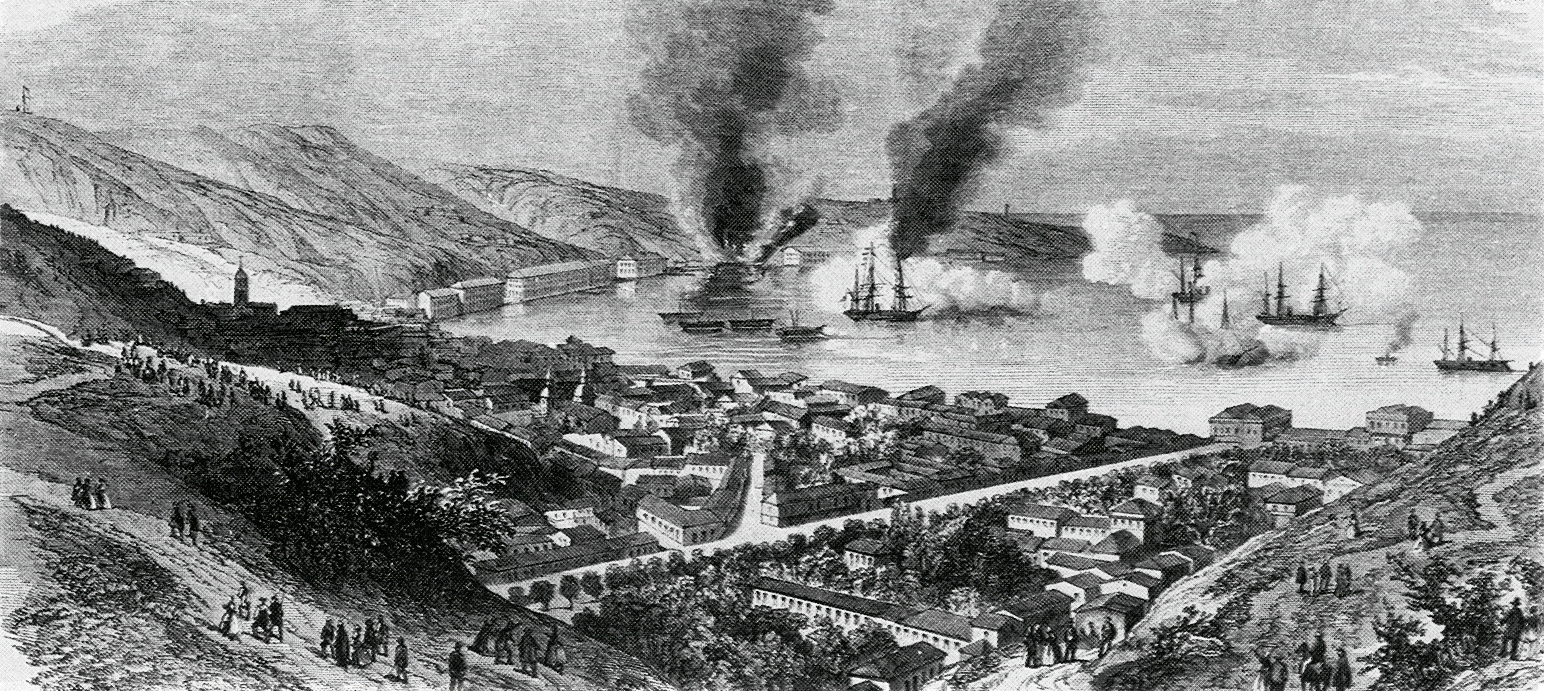 El bombardeo de Valparaiso efectuado por la escuadra española el 31 de marzo de 1866 fue un episodio de la Guerra Hispano-Sudamericana, durante el cual el puerto de Valparaiso fue bombardeado y parcialmente destruido por ordenes del almirante español Casto Méndez Núñez.